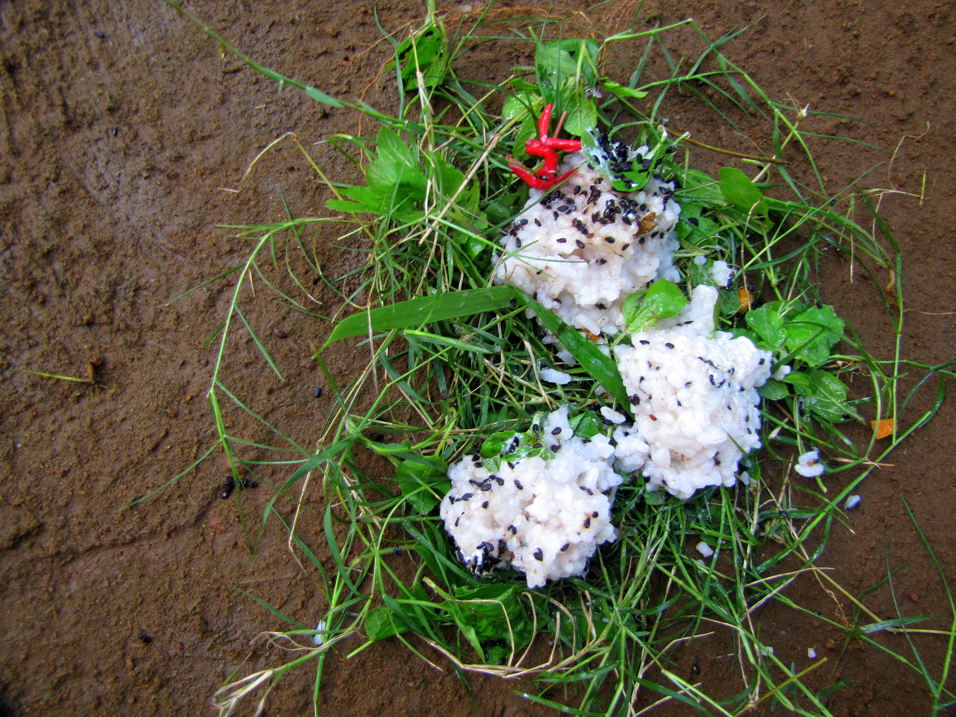 ബലിച്ചോറ്